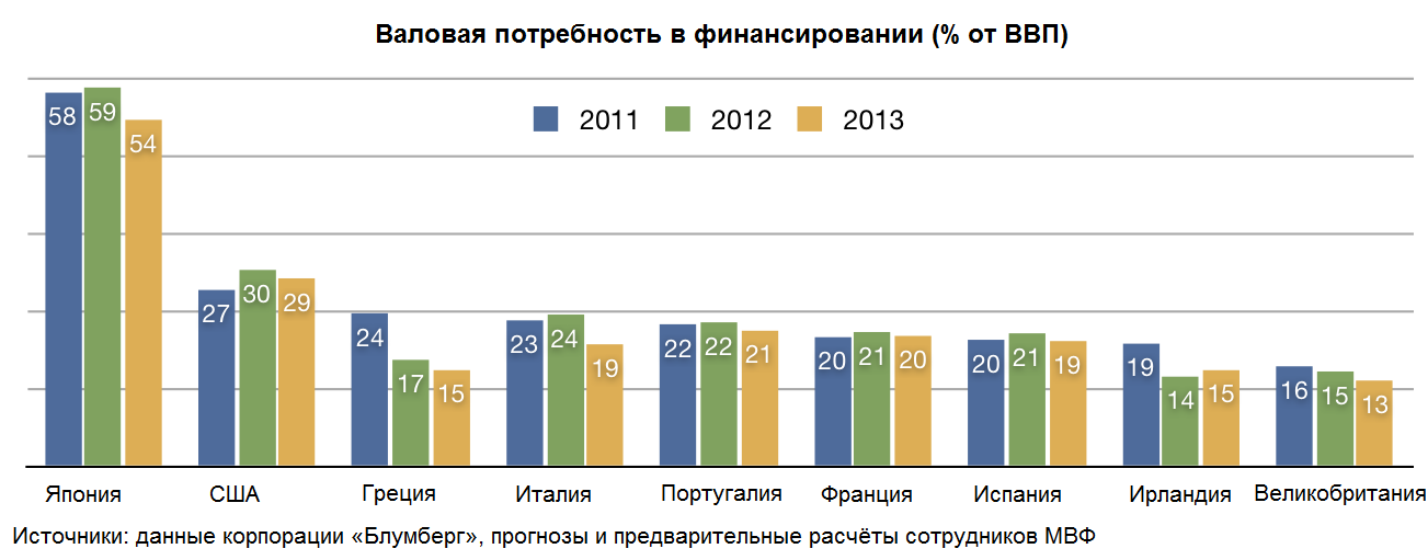 Валовая потребность в бюджетном финансировании ряда стран, в % от ВВП. Источники: агентство "Блумберг", оценки и прогнозы МВФ. См.: Примечания: Предусматривается, что по 90% облигаций Греции, по которым наступает срок платежа, будет проведено переоформление задолженности. В общую величину госдолга Ирландии, по которой будет необходимо производить платежи, включены выплаты по векселям 2010 г., выпущенным для оказания экстренной помощи финансовому сектору.